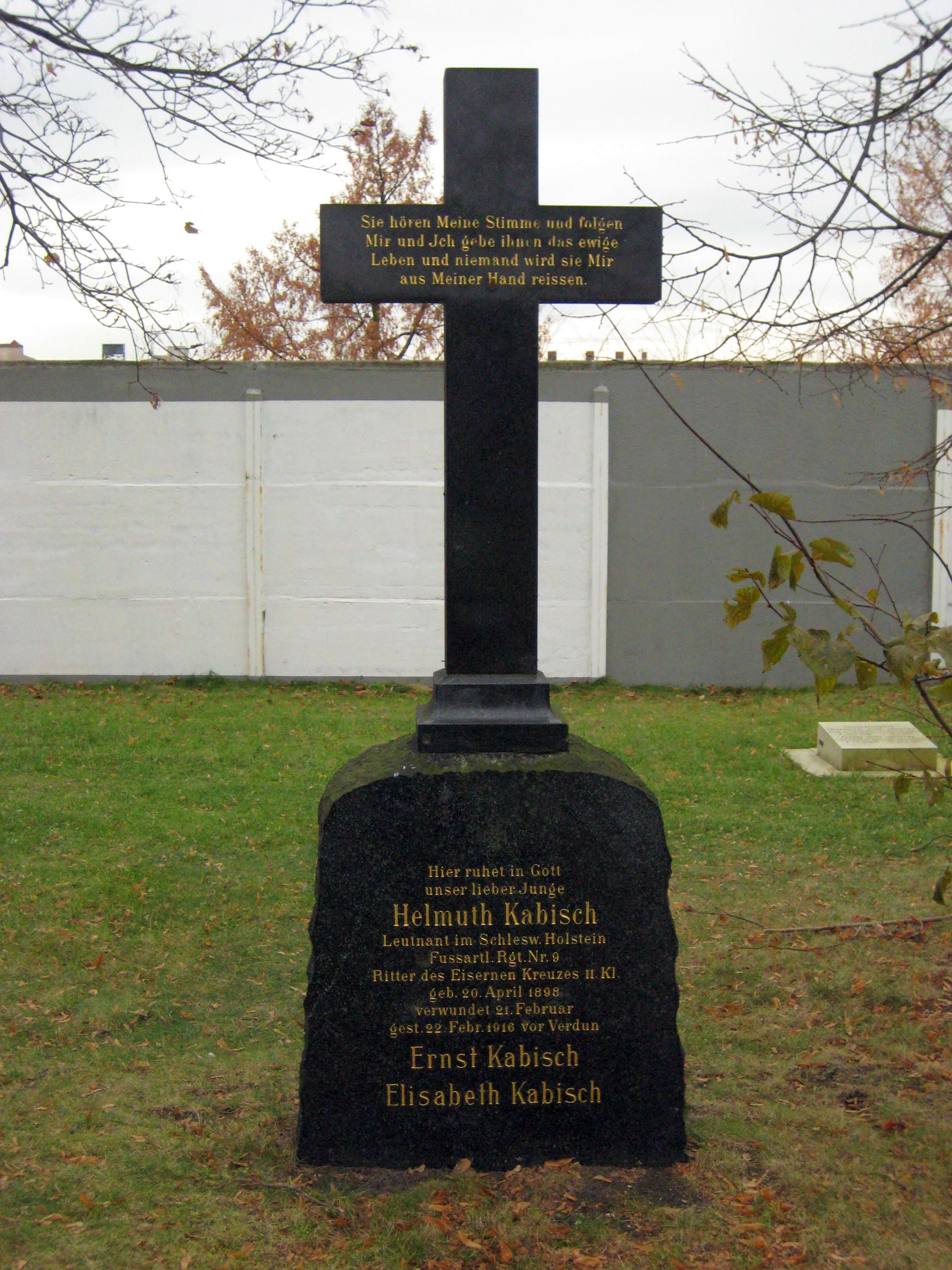 grave of Elisabeth Kabisch (1904), Helmuth Kabisch (1918) and Ernst Kabisch (1951) on Invalidenfriedhof cemetery in Berlin